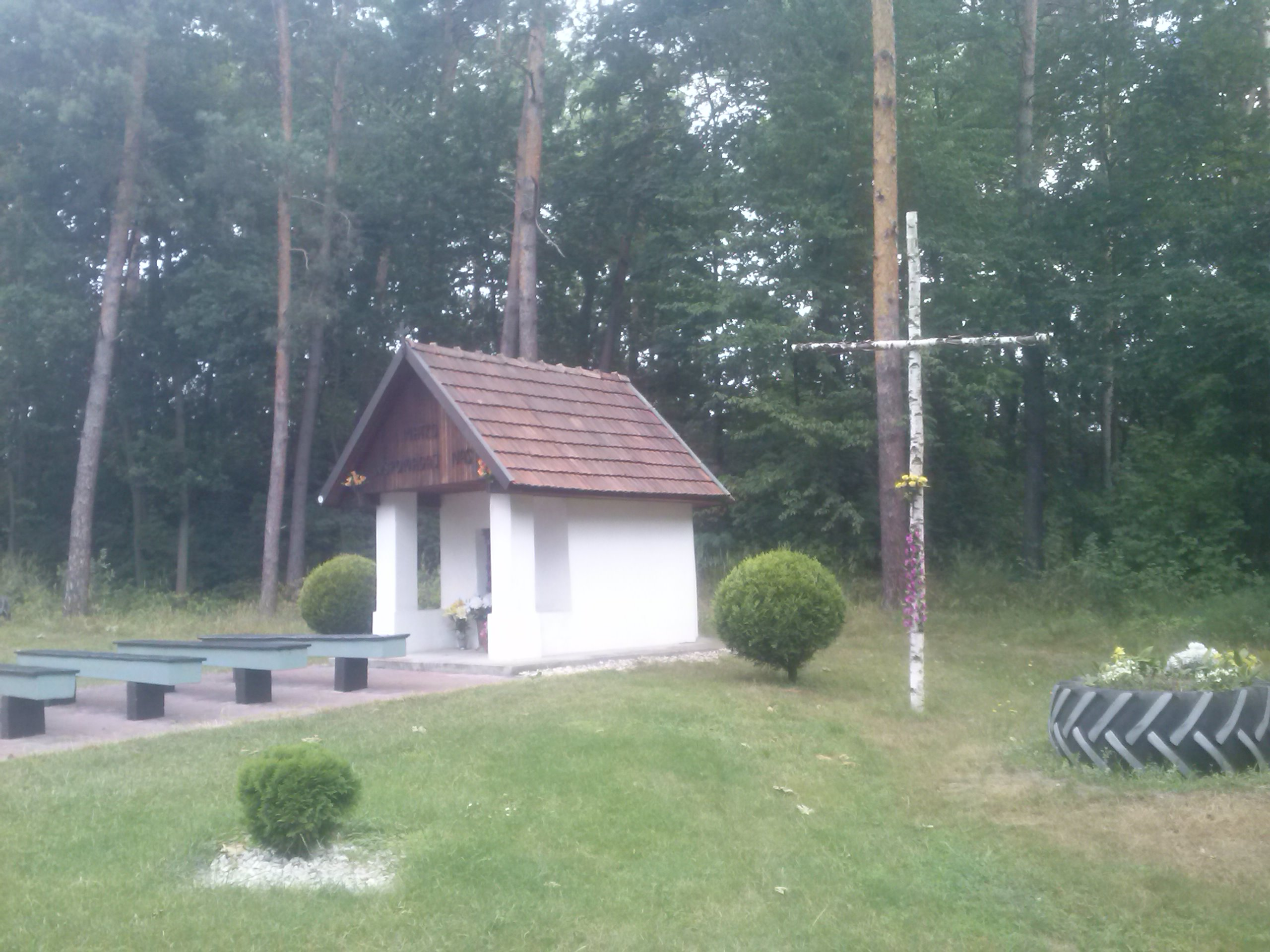 Kapliczka Matki Bożej Wspomożycielki Wiernych w Wierzawicach, w lesie przy drodze krajowej nr 77 - odcinek z Wierzawic do Leżajska